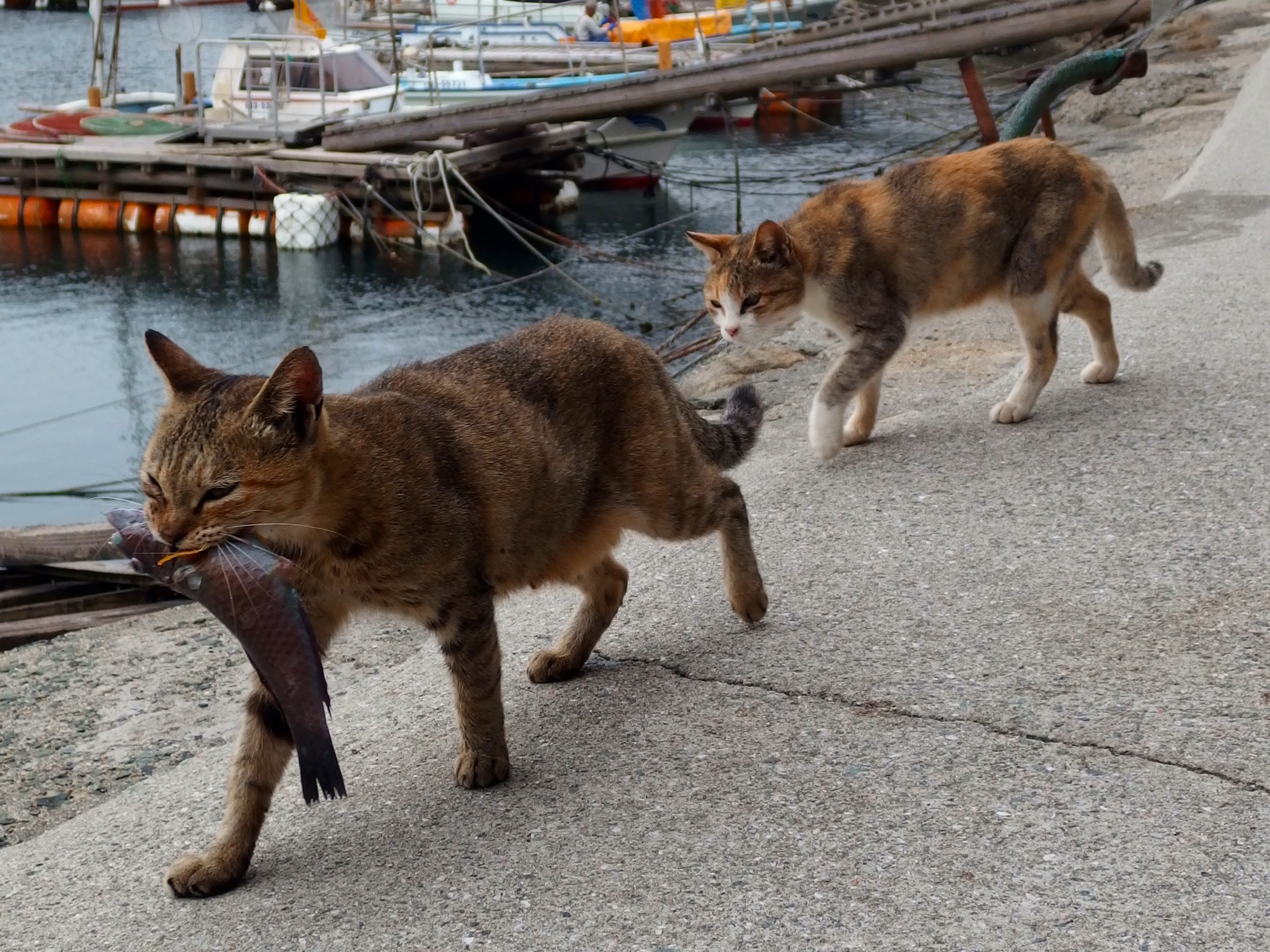 番手